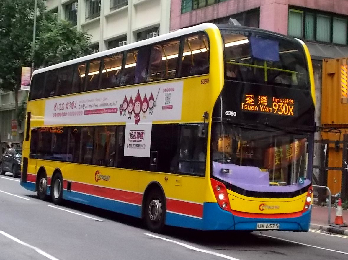 過海隧巴930X線，駛經灣仔軒尼詩道毫前往荃灣